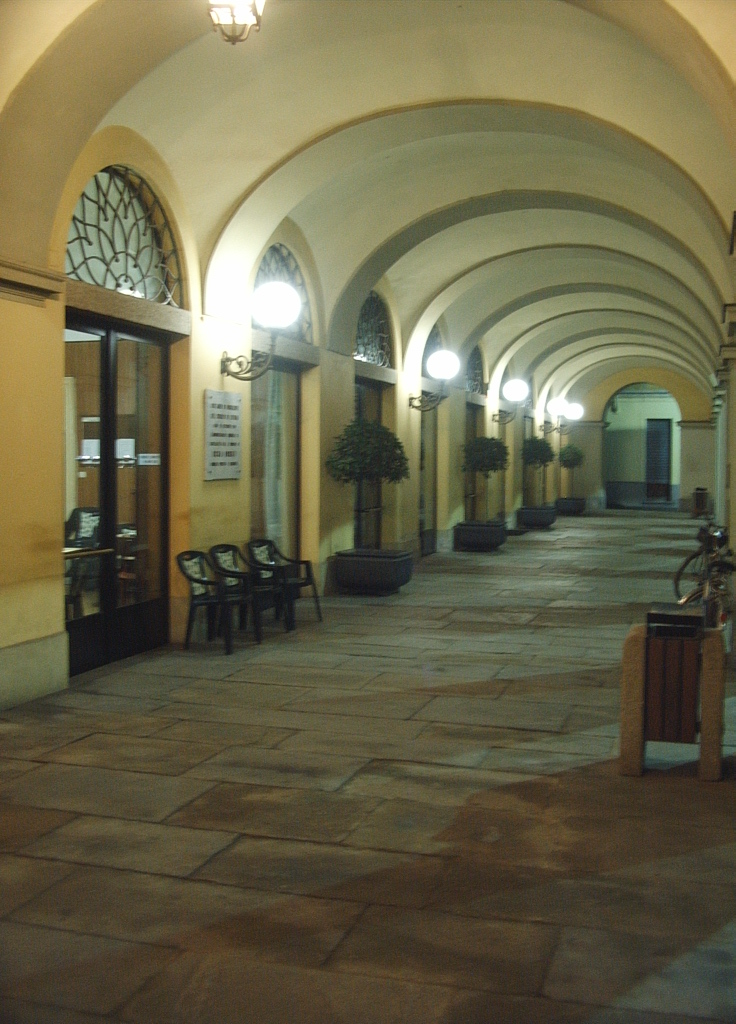 Portici comunali alla sera